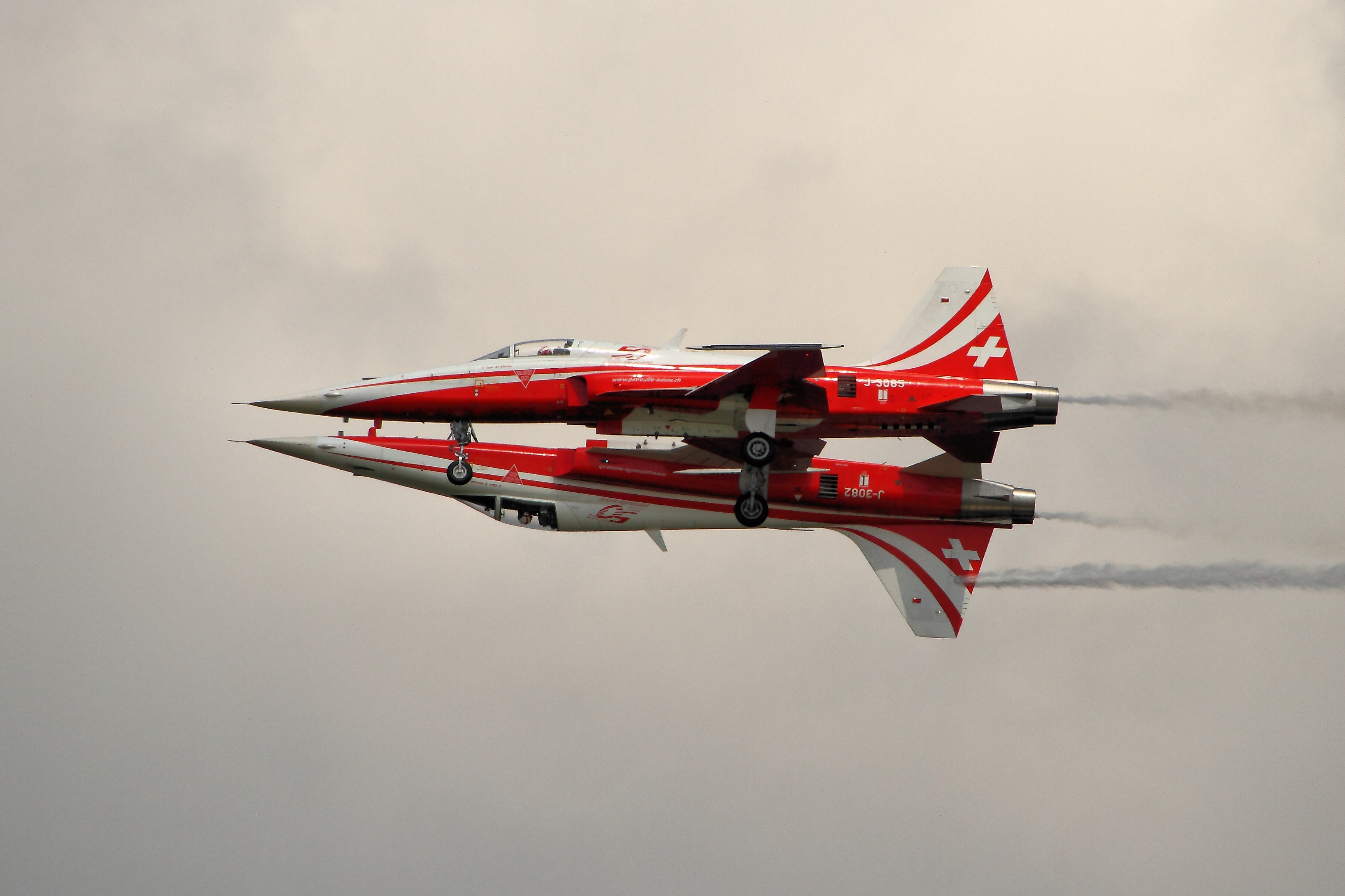 Patrouille Suisse - RIAT 2014